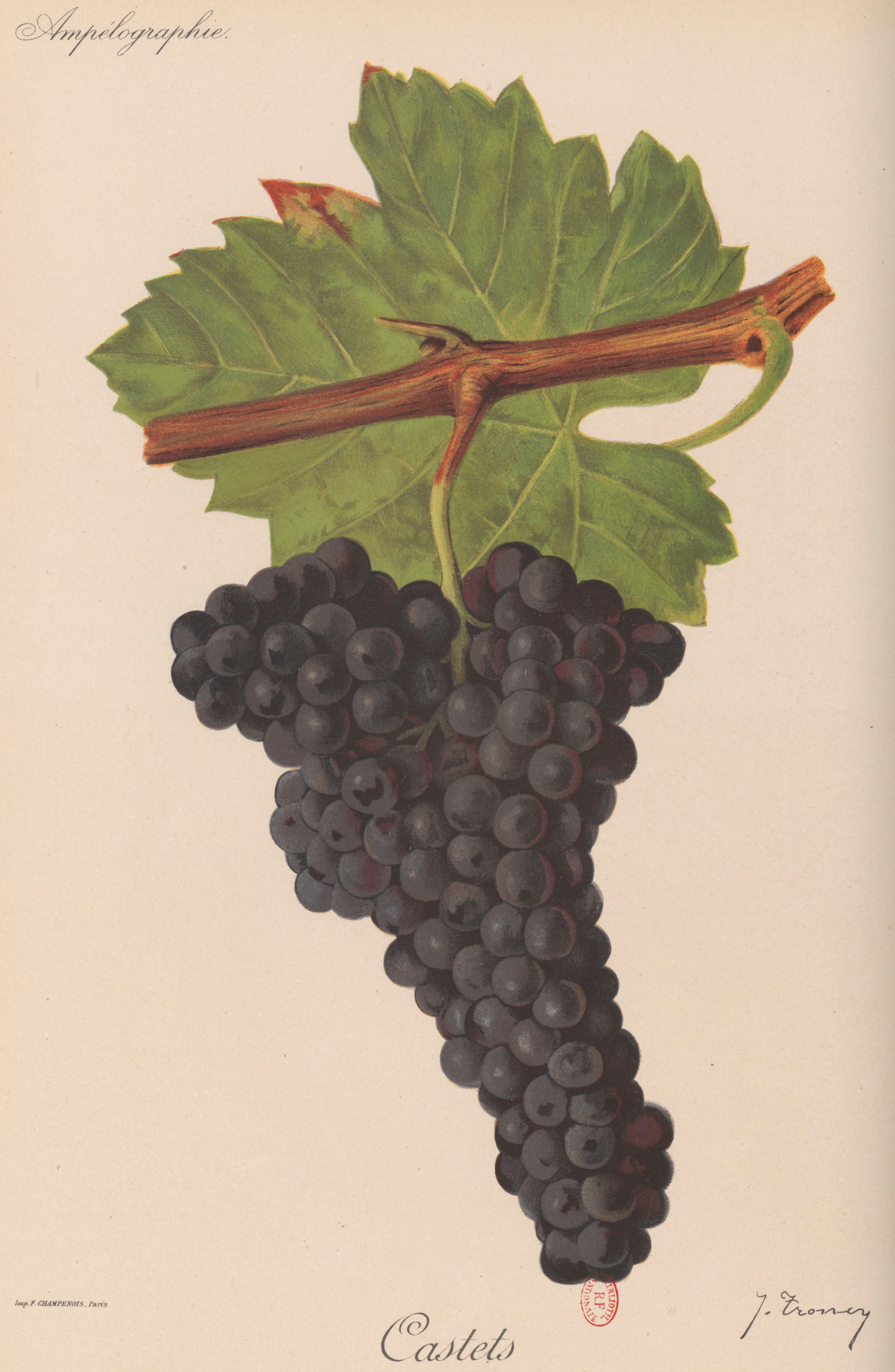 Grappe de Castets par Viala et Vermorel